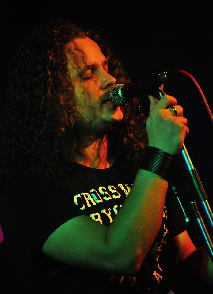 zpěvák skupiny Narttu